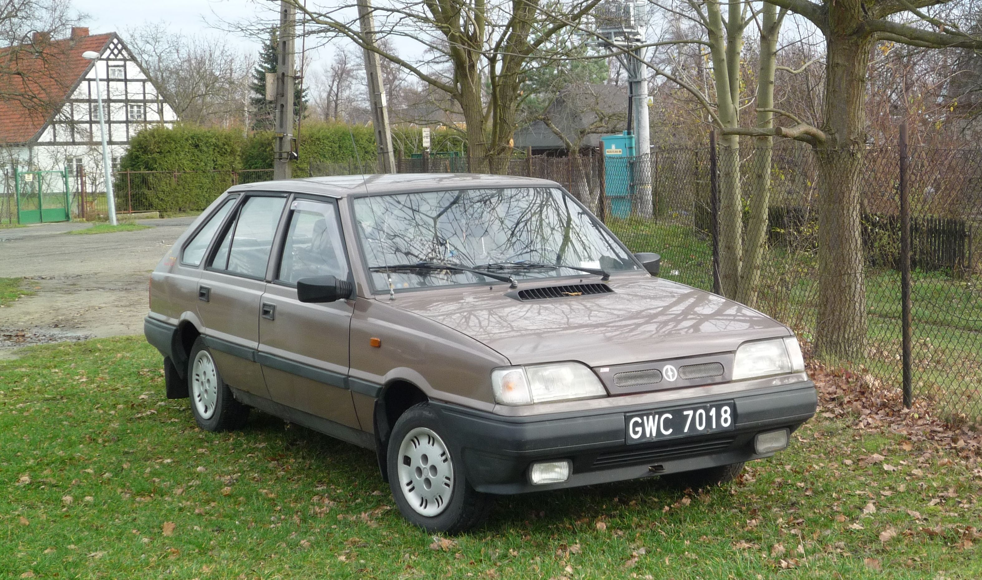 FSO Polonez Caro MR'91 1.5 GLE w Słubicach.